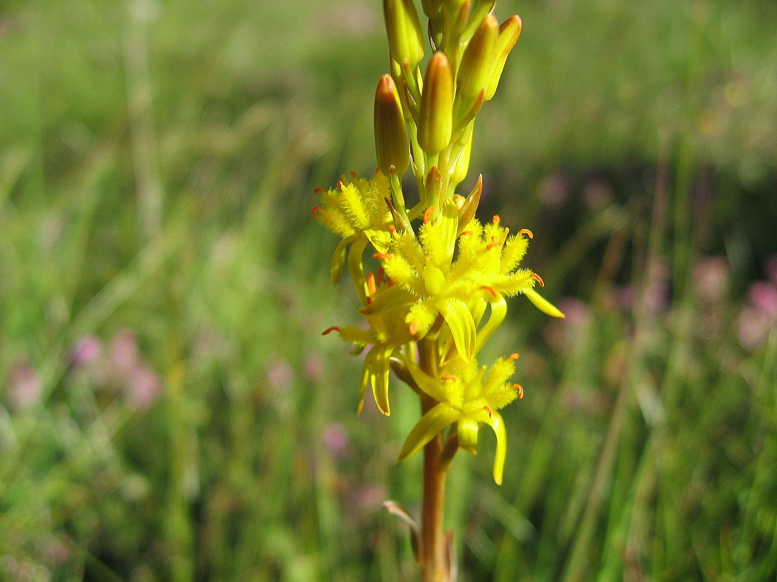 Beinbrech (Narthecium ossifragum)